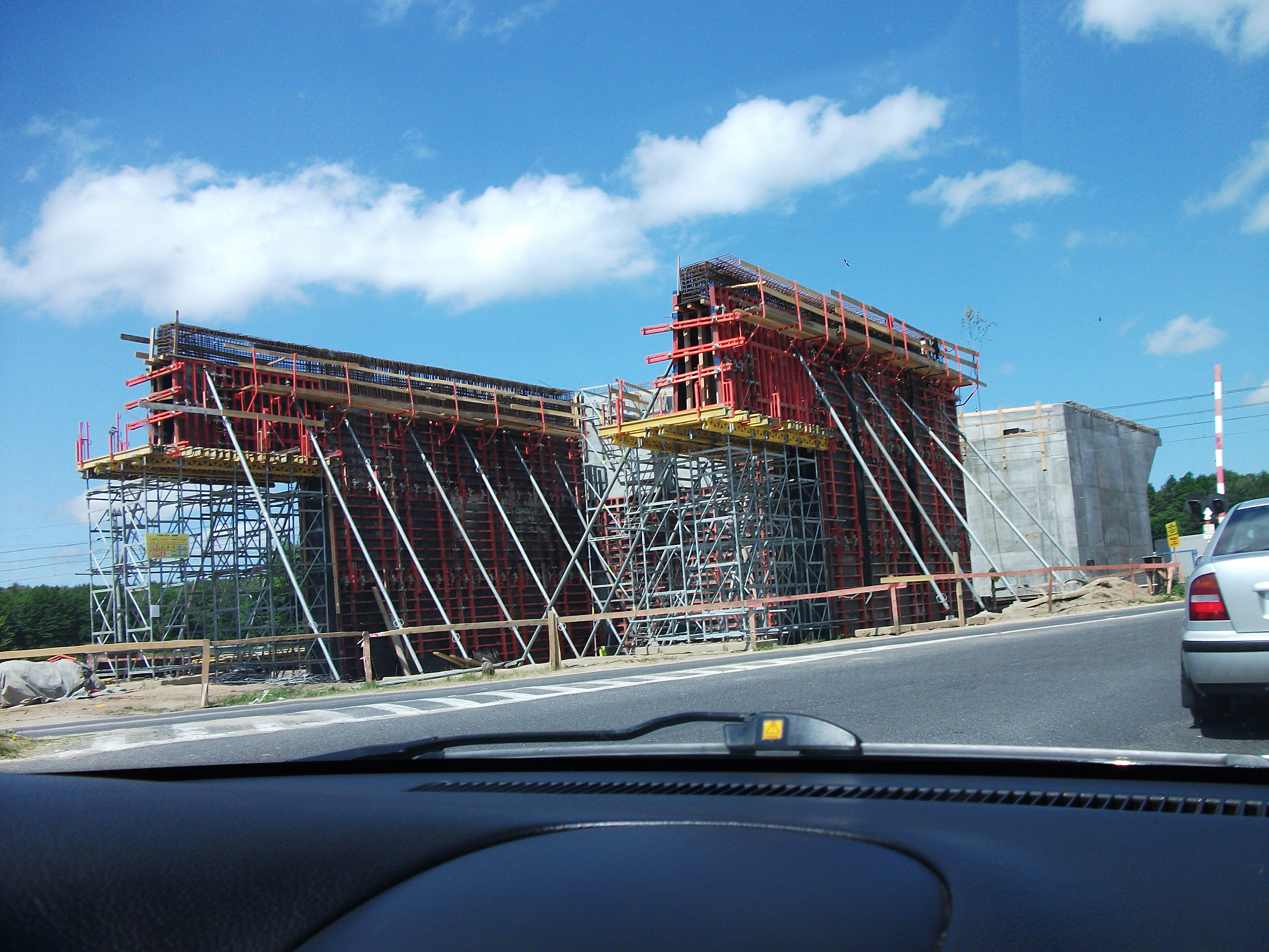 Budowany wiadukt w ciągu drogi wojewódzkiej 107 w Parłówku nad linią kolejową nr. 401.